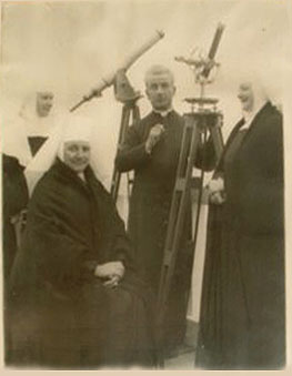 Don. Nikola Miličević, monk and astronomer, Pustinja Blaca monastery, Brač island, Croatia.